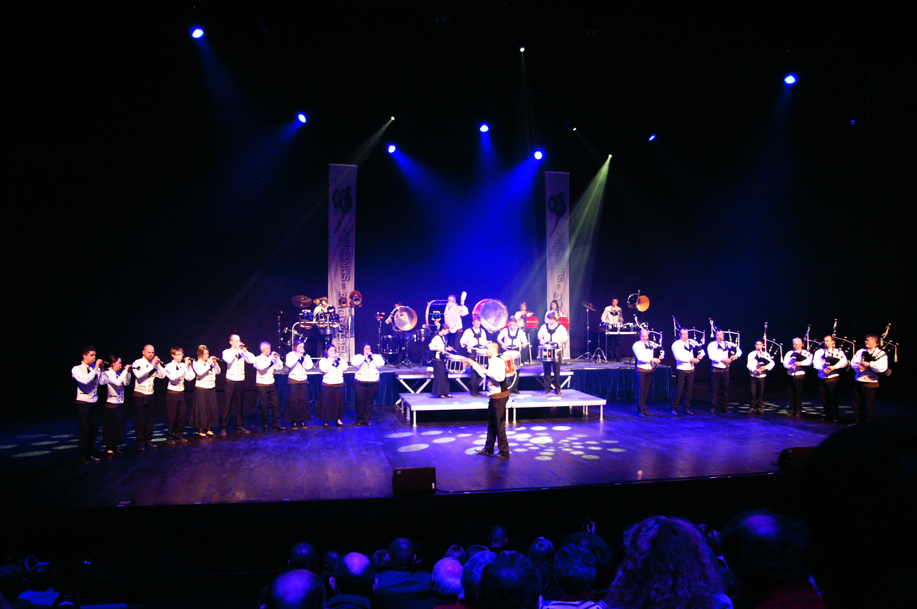 Le bagad Bro Felger se produisant en concours à Saint-Brieuc (Côtes-d'Armor, France).